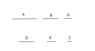 Il·lustració d'una de les proposiciones de les Data d'Euclides